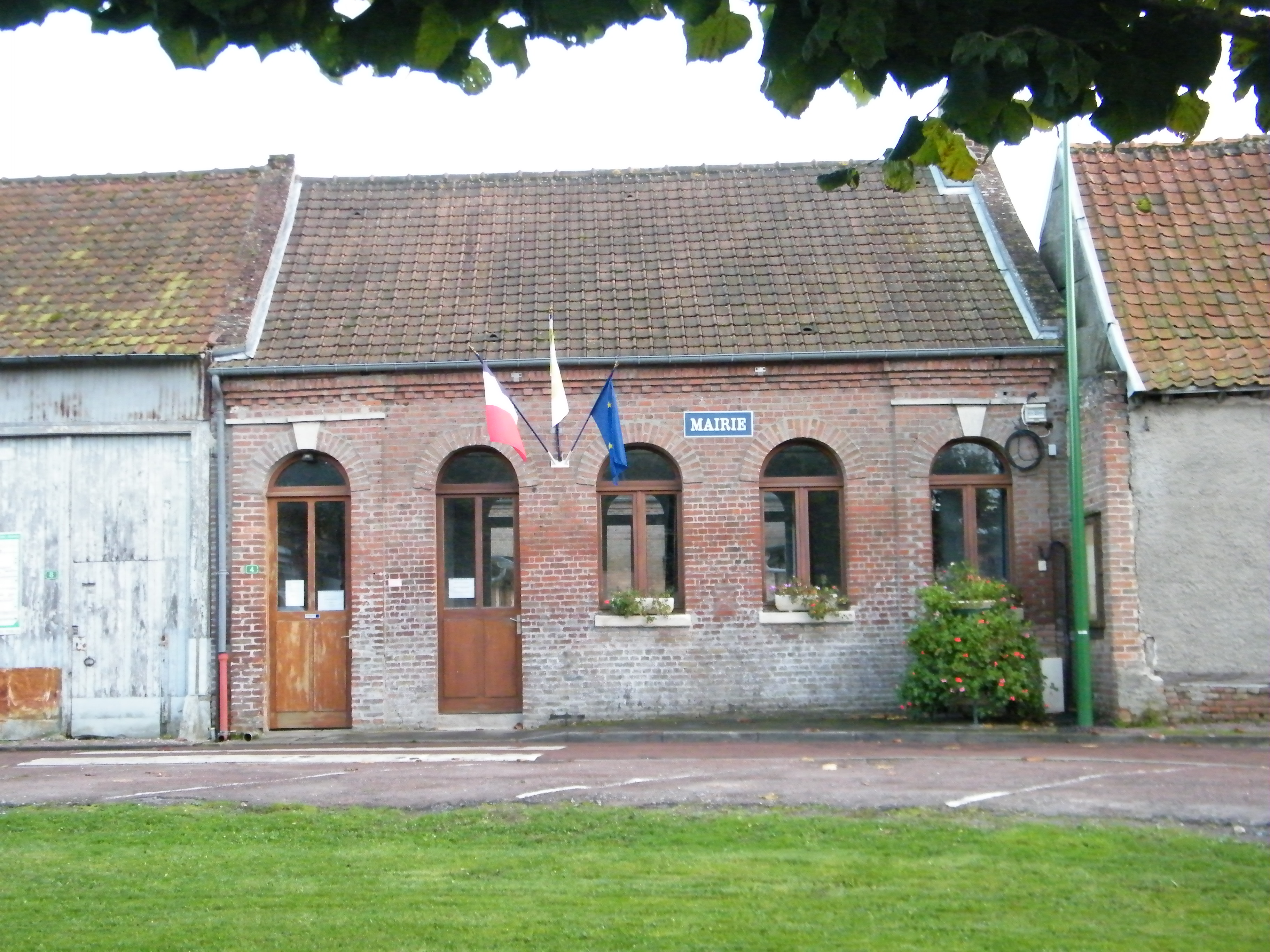 Mairie.